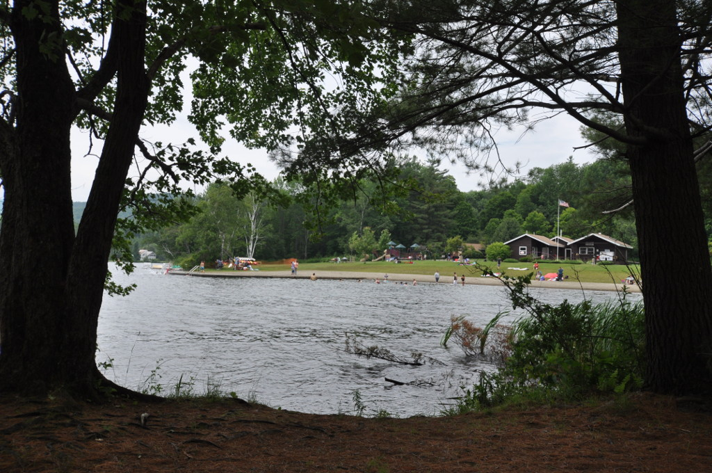 Silver Lake State Park, Barnard, Vermont